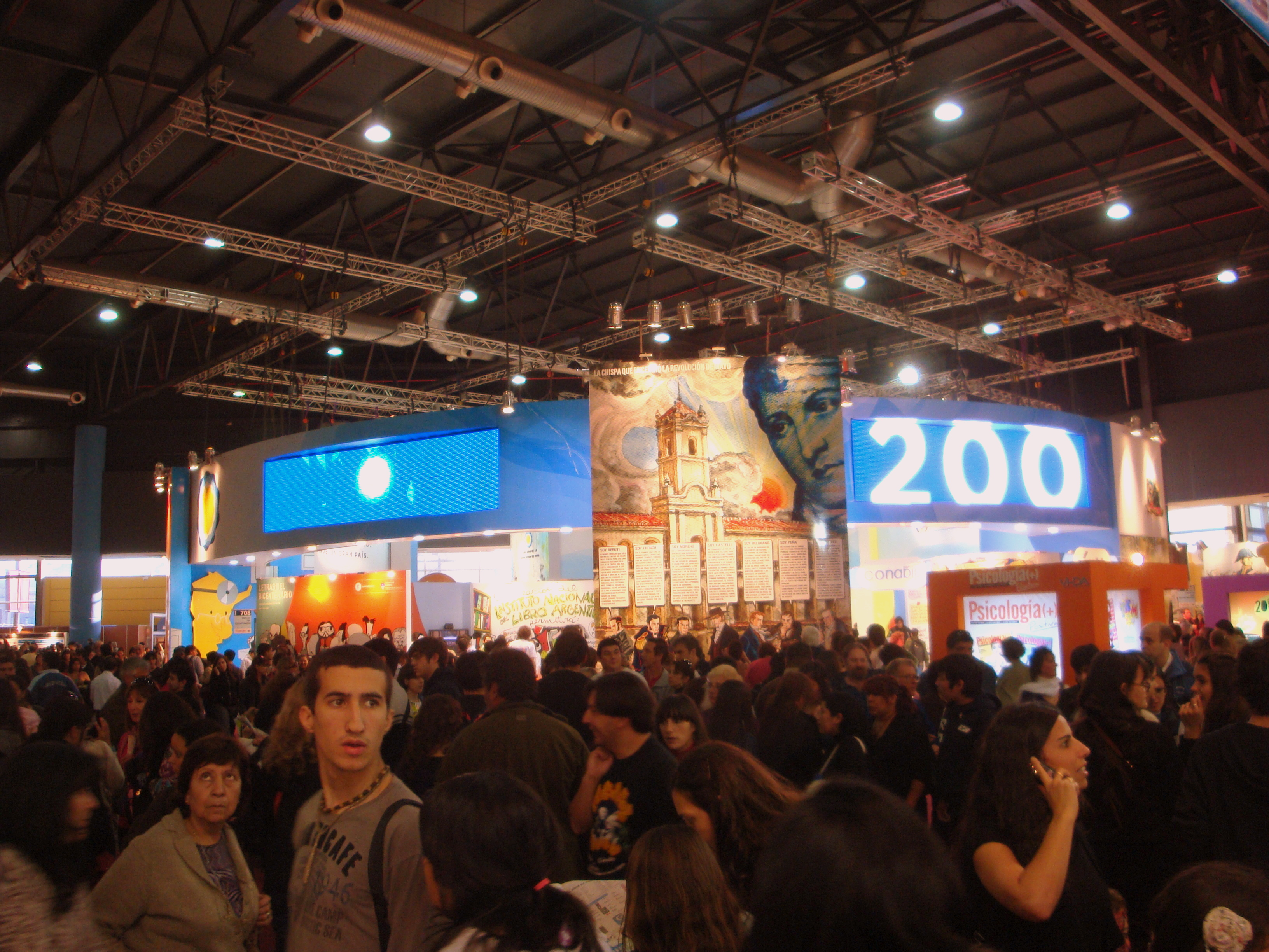 Stand relacionado con el bicentenario en la Feria Internacional del Libro de Buenos Aires